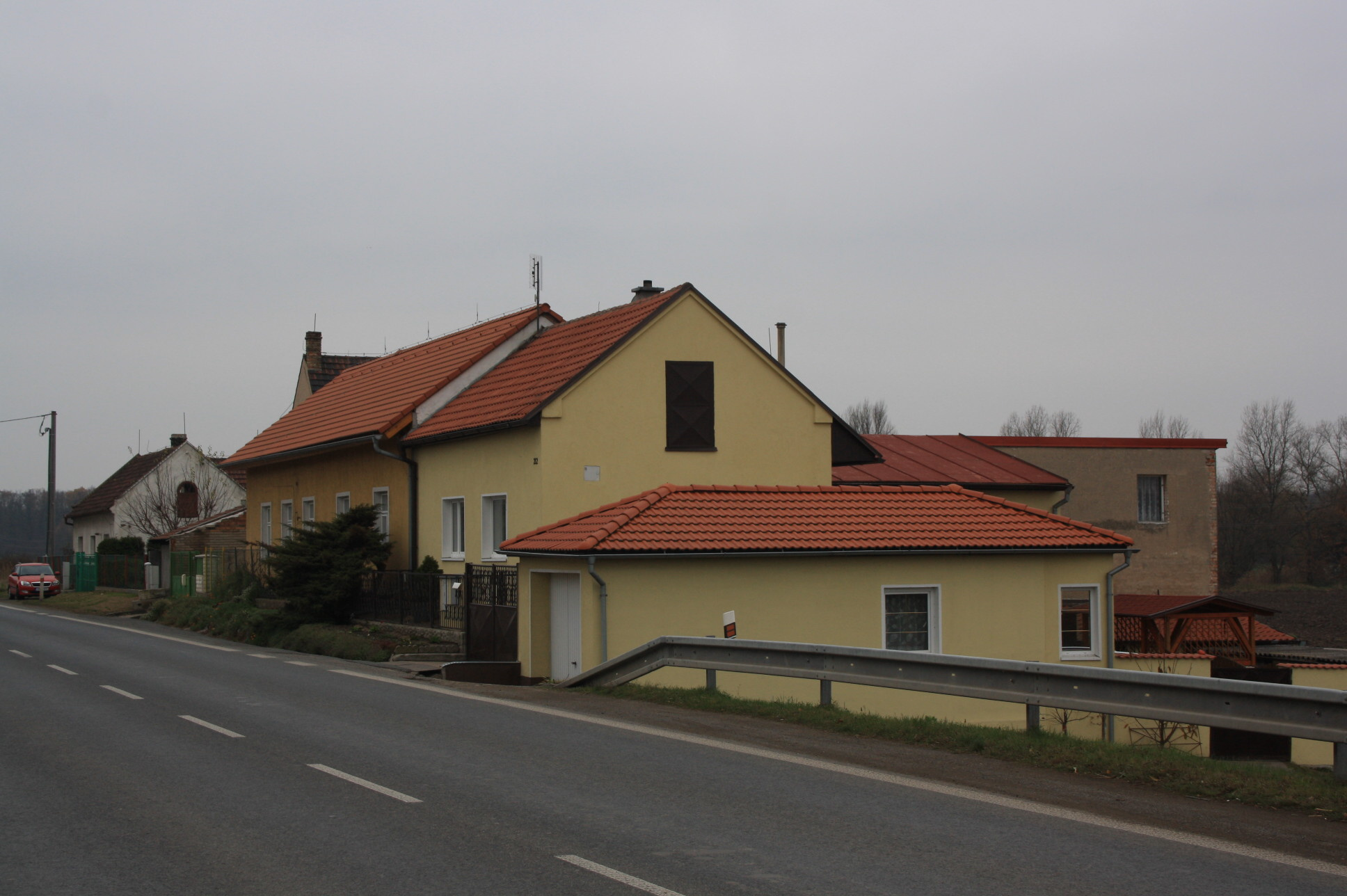 Řada domů (z prava doleva) číslo popisné 212, 217 a 192 ve Větrušicích, části obce Kly.